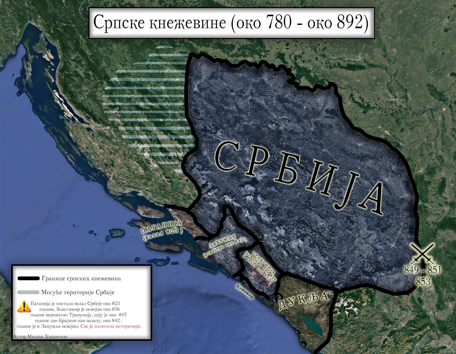 Српске земље у 8. и 9. веку.